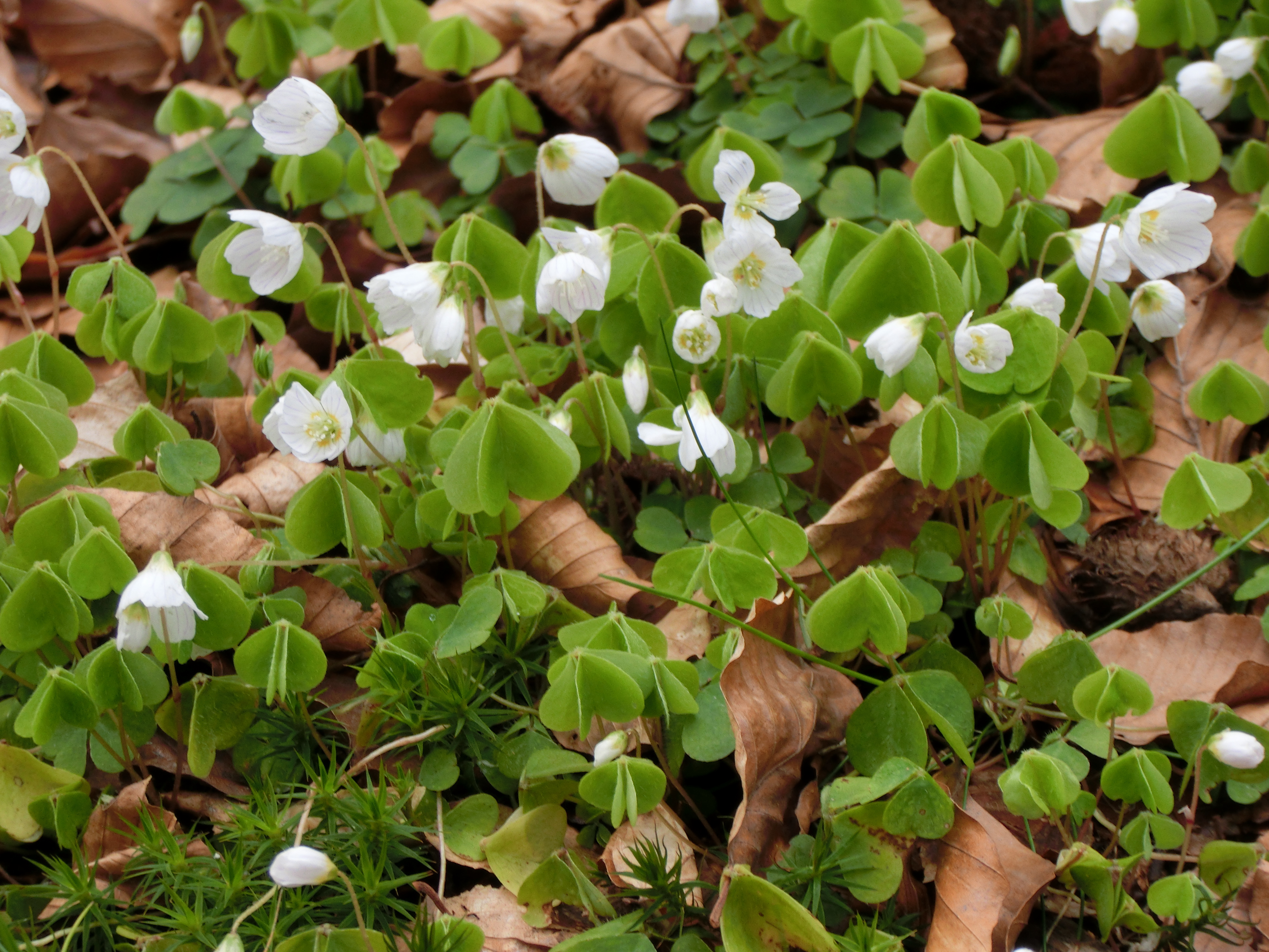 Pain de coucou